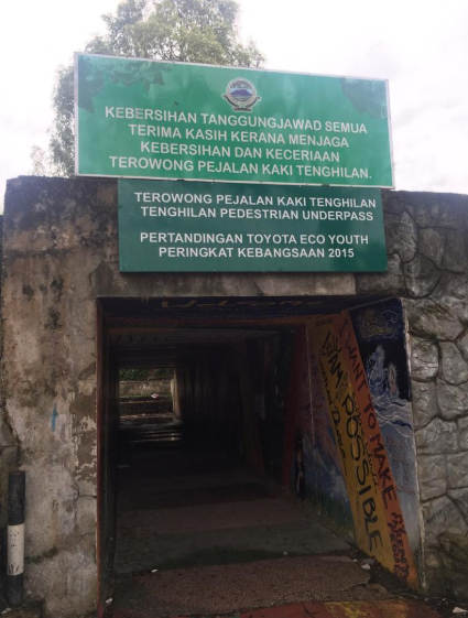 Terowong pejalan kaki Tenghilan